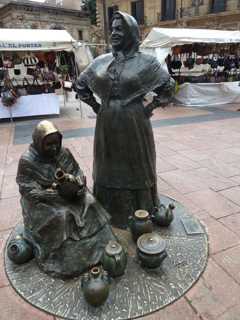 Vendedoras del Fontán (Amado González Hevia Favila), Uviéu (Asturies).